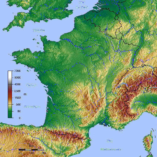 Carte France Topographique 500x500 JPG Source:Wikisoft* @@@ 5 janvier 2009 Ã 10:58 (CET) Catégorie:France Licence